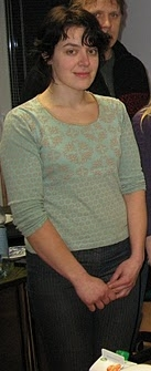 Airi Hallik-Konnula